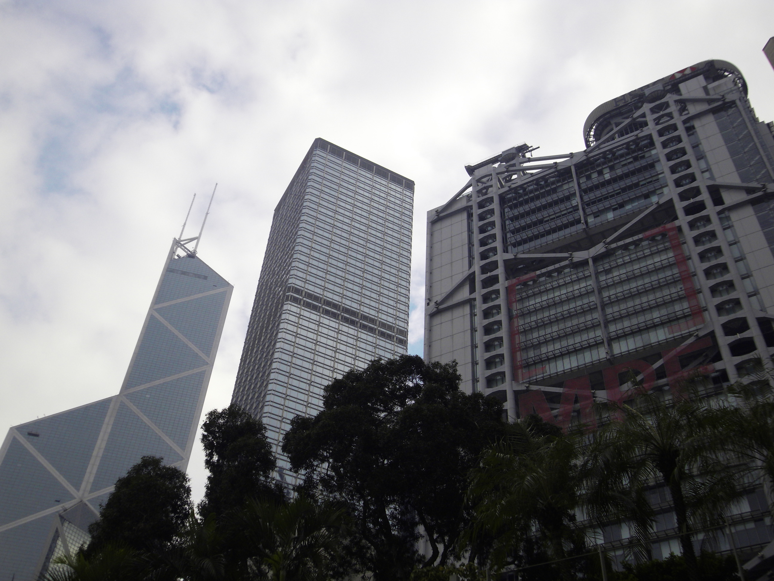 中文（香港）: 香港中環區商業大廈: 中國銀行大廈, 長江中心, 匯豐銀行總部大廈